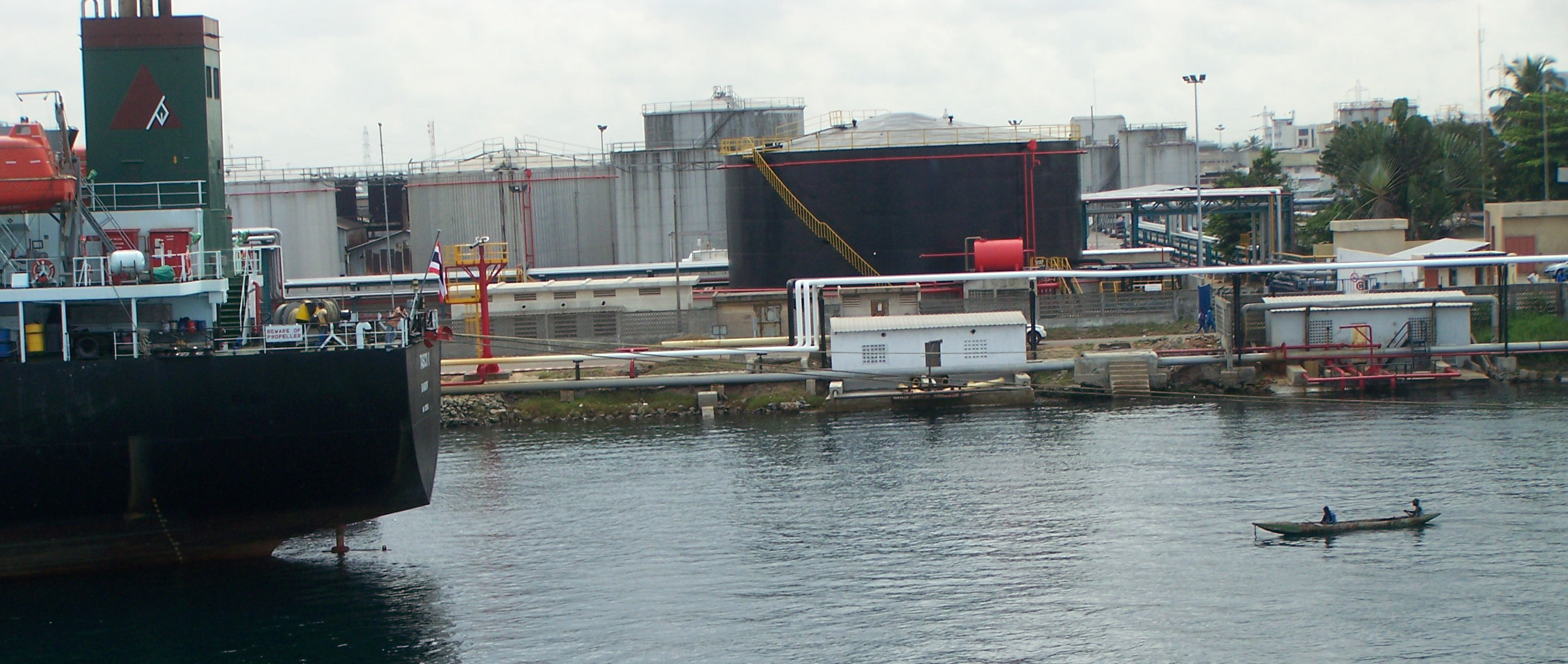 Chenalage en sortant du port d'Abidjan